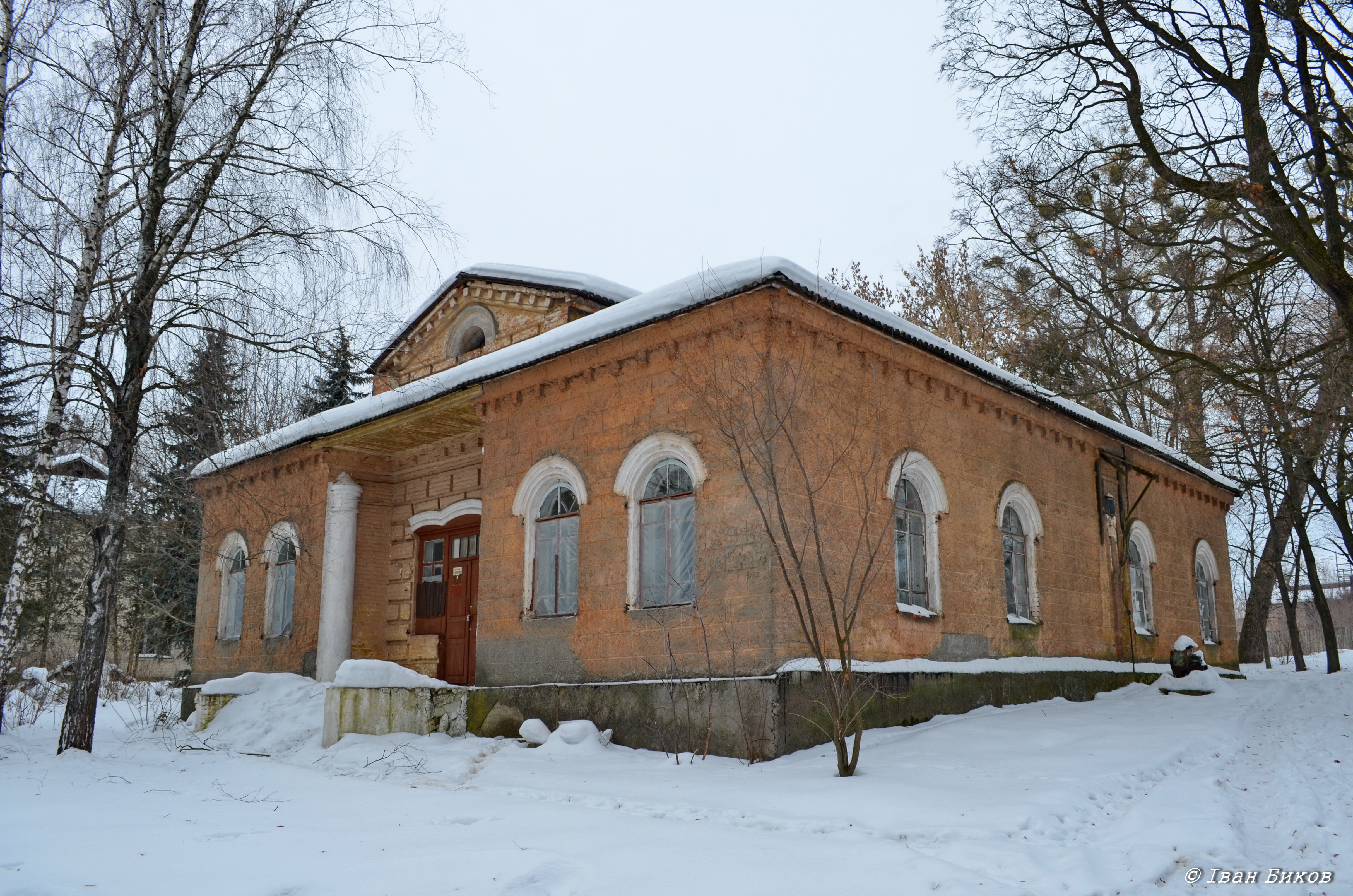 Садибний будинок поміщика Синельникова, Литвинівка